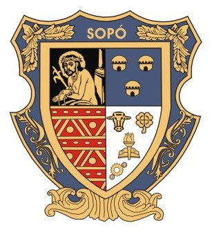 Mediante acuerdo número 025 del 17 de noviembre de 1993 se adoptó como escudo de armas de Sopó el modelo que se ajusta a la siguiente descripción: Blasón de tipo Francés cuartelado en cruz: En el primer cuartel la imagen de mi padre Jesús de la piedra, aureolado de oro, sobre campo de sable que representa la revelación milagrosa ocurrida en este terruño en 1753. En el segundo cuartel tres bohíos indígenas terrazados, de oro en campo de azur que representan los caseríos aborígenes de Cueca, Meusa y Sopó que se fusionaron en uno y sé reubicaron para formar el hoy pueblo de Sopó. En el tercer cuartel un diseño precolombino muisca, en oro sobre campo de gules que representa la cultura aborigen que se asentó en este territorio. En el cuarto y último cuartel una cabeza de ganado, símbolo de la principal actividad económica del municipio; un trébol que representa la fertilidad de su tierra; Un engranaje que significa su pujante industria; Un libro y una antorcha que simboliza la intelectualidad, el deporte y la salud física y mental de su juventud. La bordura del blasón recoge el arte que adorna el marco de los cuadros de los ángeles de Sopó, reconocidos internacionalmente y en interior, en la parte superior, se lee SOPÓ.